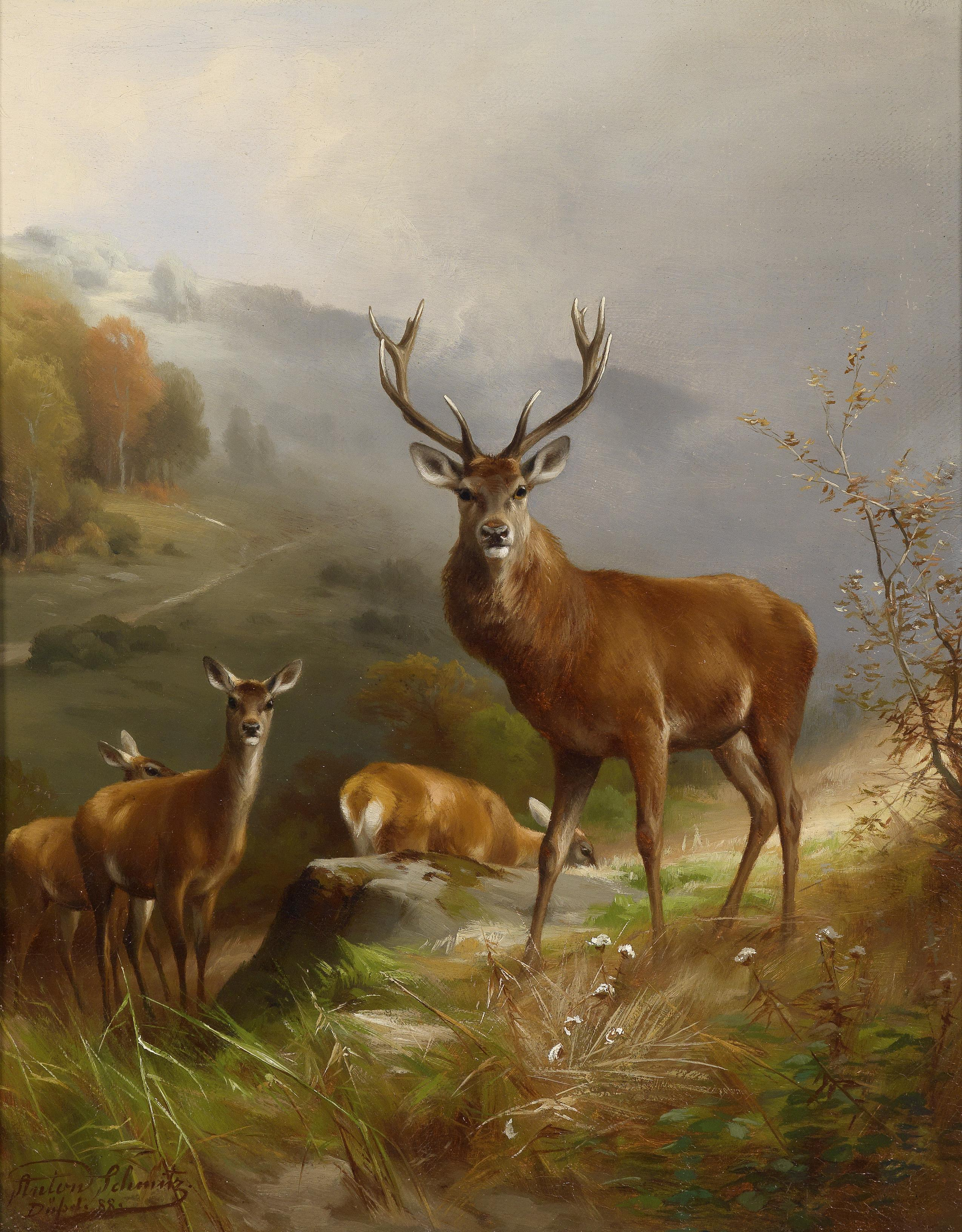 Rotwild, signiert, bezeichnet und datiert Anton Schmitz Düssd. (18)88, Öl auf Leinwand, 39 x 31,5 cm